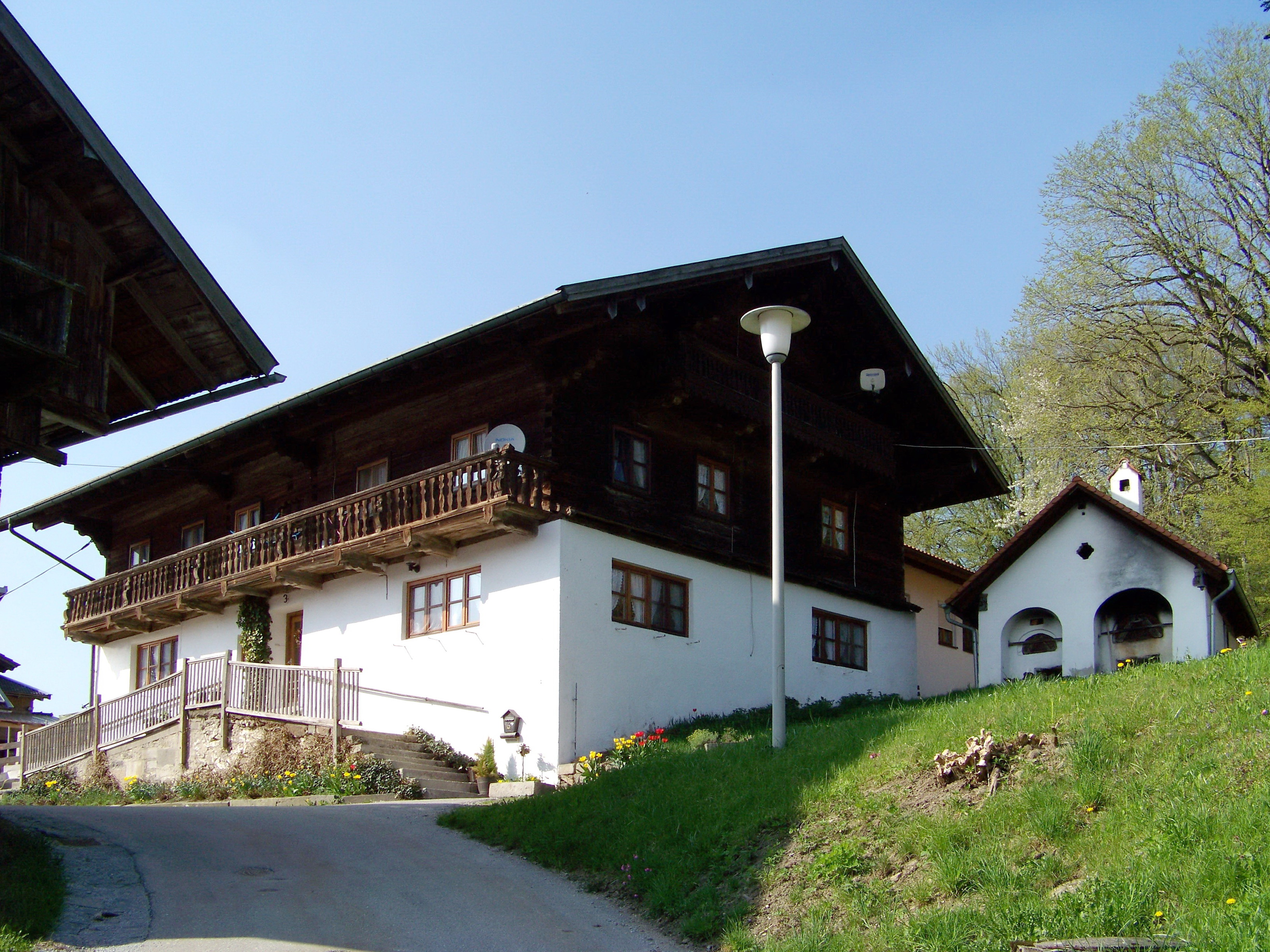 Grattersdorf, Falkenacker 3. Ehem. Wohnstallhaus. Flachsatteldachbau mit Blockbau-Obergeschoss, Trauf- und Giebelschrot, 18./19. Jahrhundert; Backhaus, Satteldachbau mit Doppelbackofen, 18. /19. Jahrhundert; ehem. Austragshaus und Traidkasten, zweigeschossiger Blockbau über Bruchsteinsockel mit Flachsatteldach, Giebelschrot und Außentreppe, 2. Hälfte 18. Jahrhundert